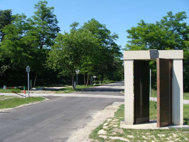 Gedenkstätte Paneuropäisches Picknick: Grenzübergang St.Margarethen (Bgld) / Sopronköhida - Blick nach Österreich